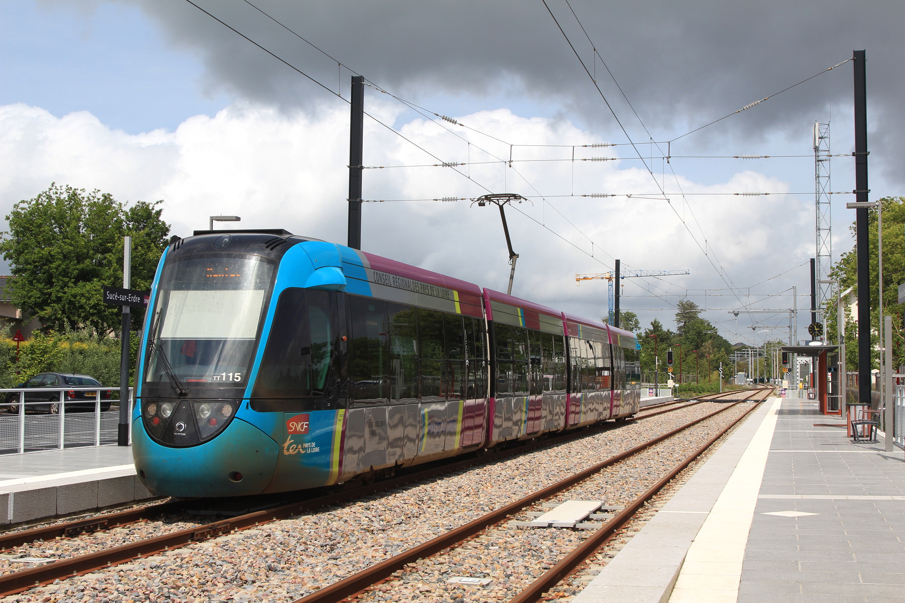 Un tram-train en gare de Sucé-sur-Erdre, après avoir effectué un TER Nantes - Sucé et avant de faire un TER Sucé - Nantes.